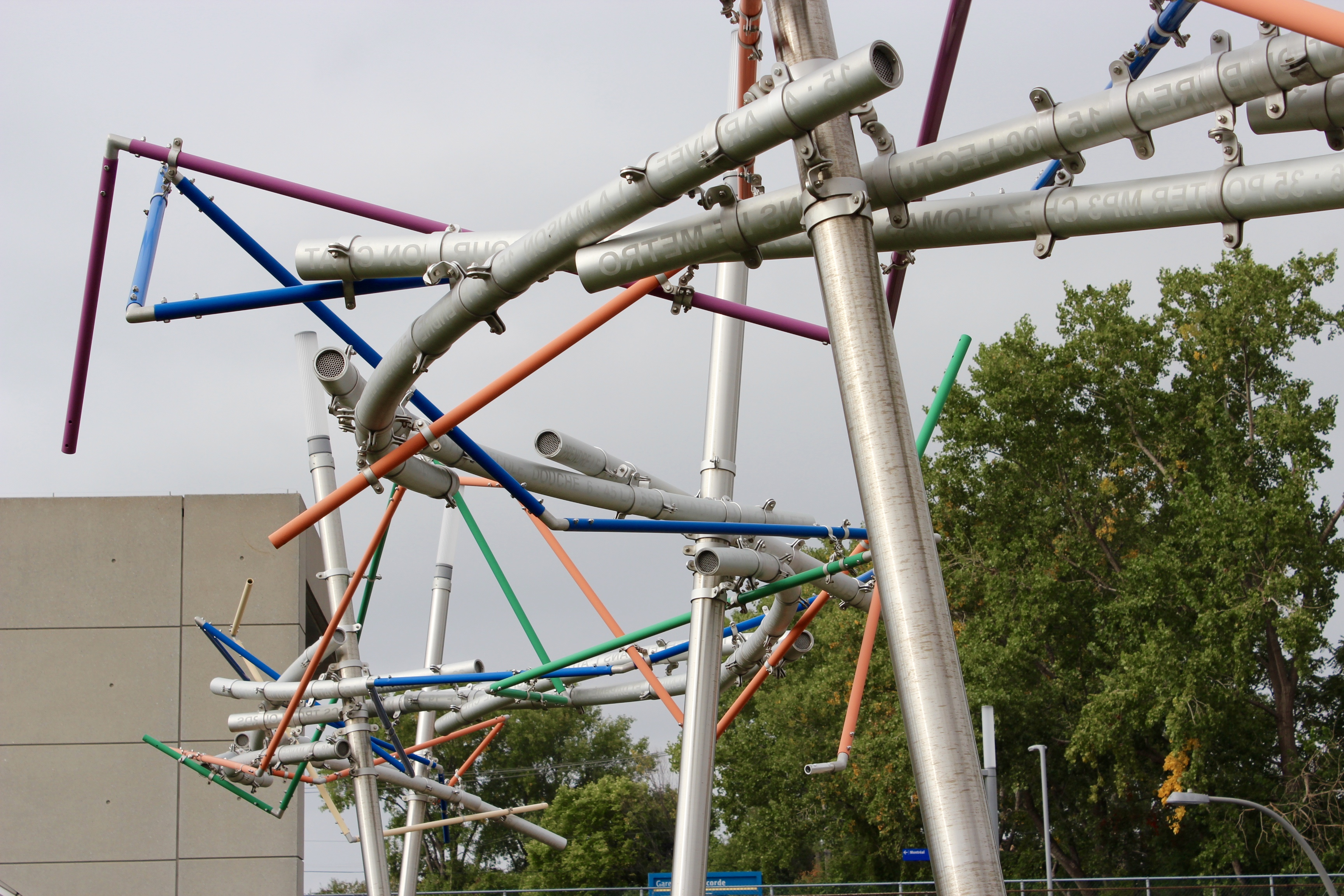 Nos allers-retours, Yves Gendreau, 2007. Située à l'extérieur, l'œuvre est un enchevêtrement de courbes et de droites en acier.